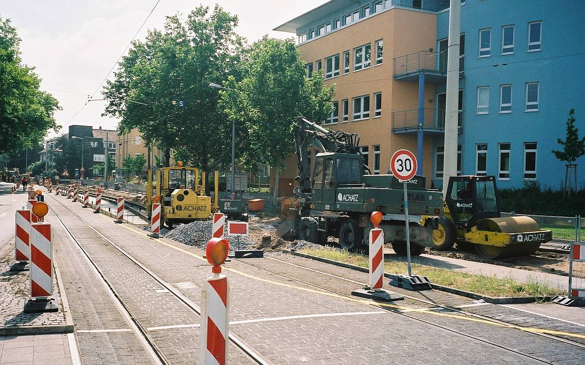 Eine Baustelle im Juni 2004 (Umbau der Straßenbahn-Haltestelle Am Aubuckel in Mannheim-Feudenheim) * selbst Fotografiert * GFDL